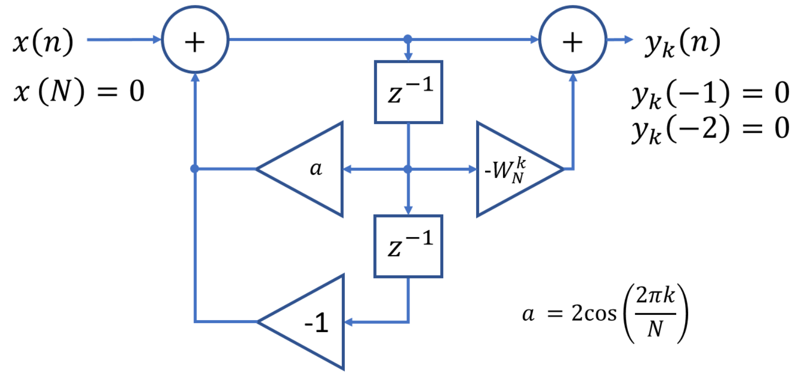 格策爾二階系統圖